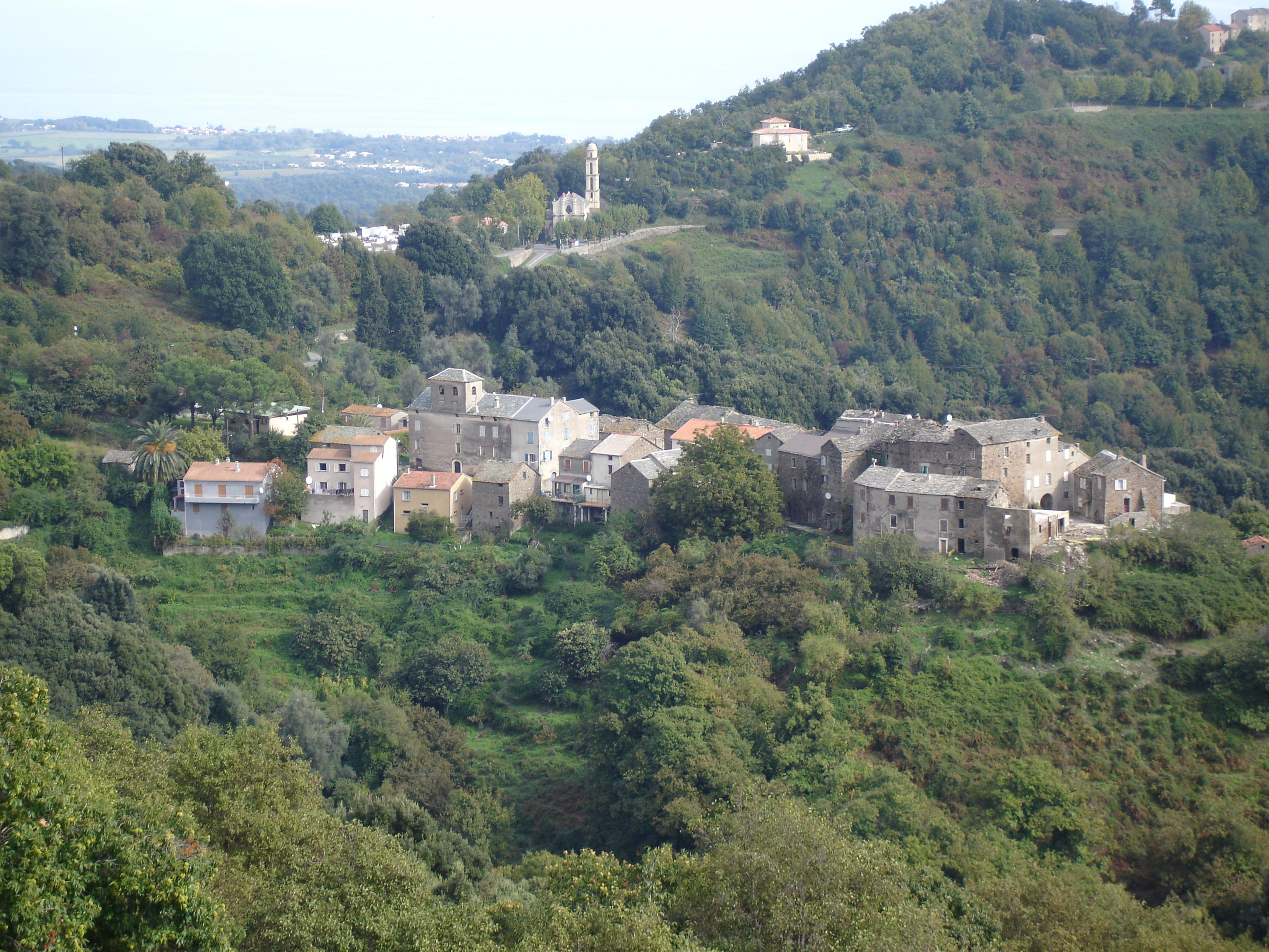 Velone-Orneto Hameau Orneto